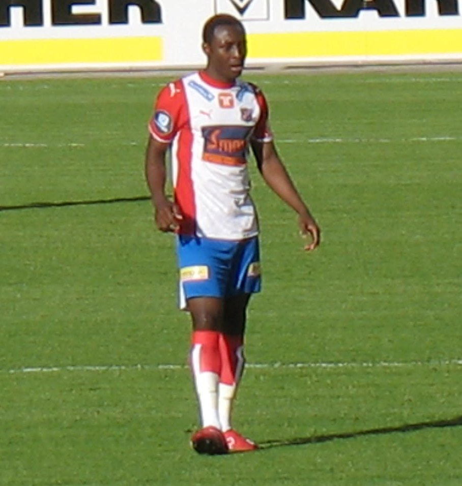 Fotballspilleren Chinedu Ogbuke